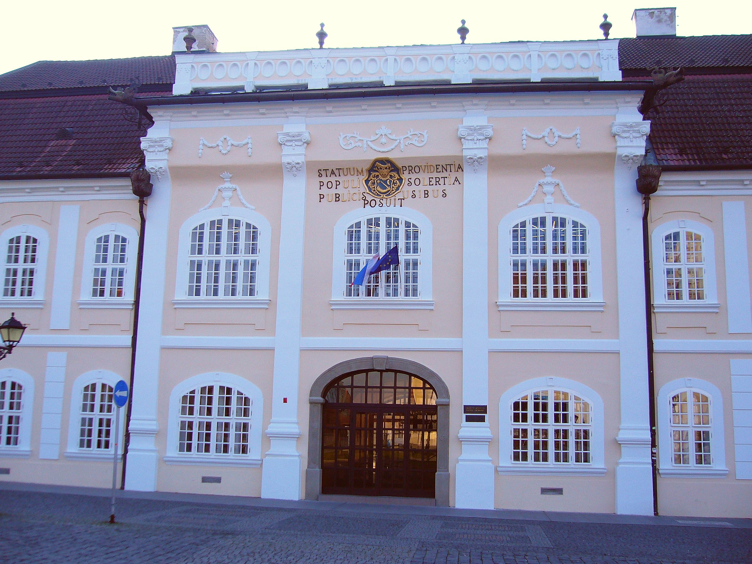 Rimaszombat, a régi vármegyeháza, Főtér